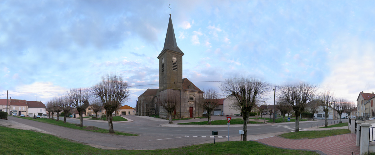 Place de l’Église à Varennes-sur-Amance, avril 2004